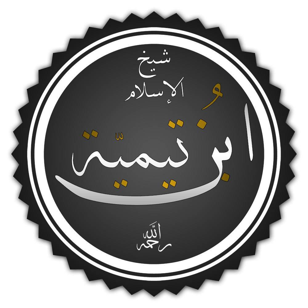 تخطيط كلمة ابن تيمية